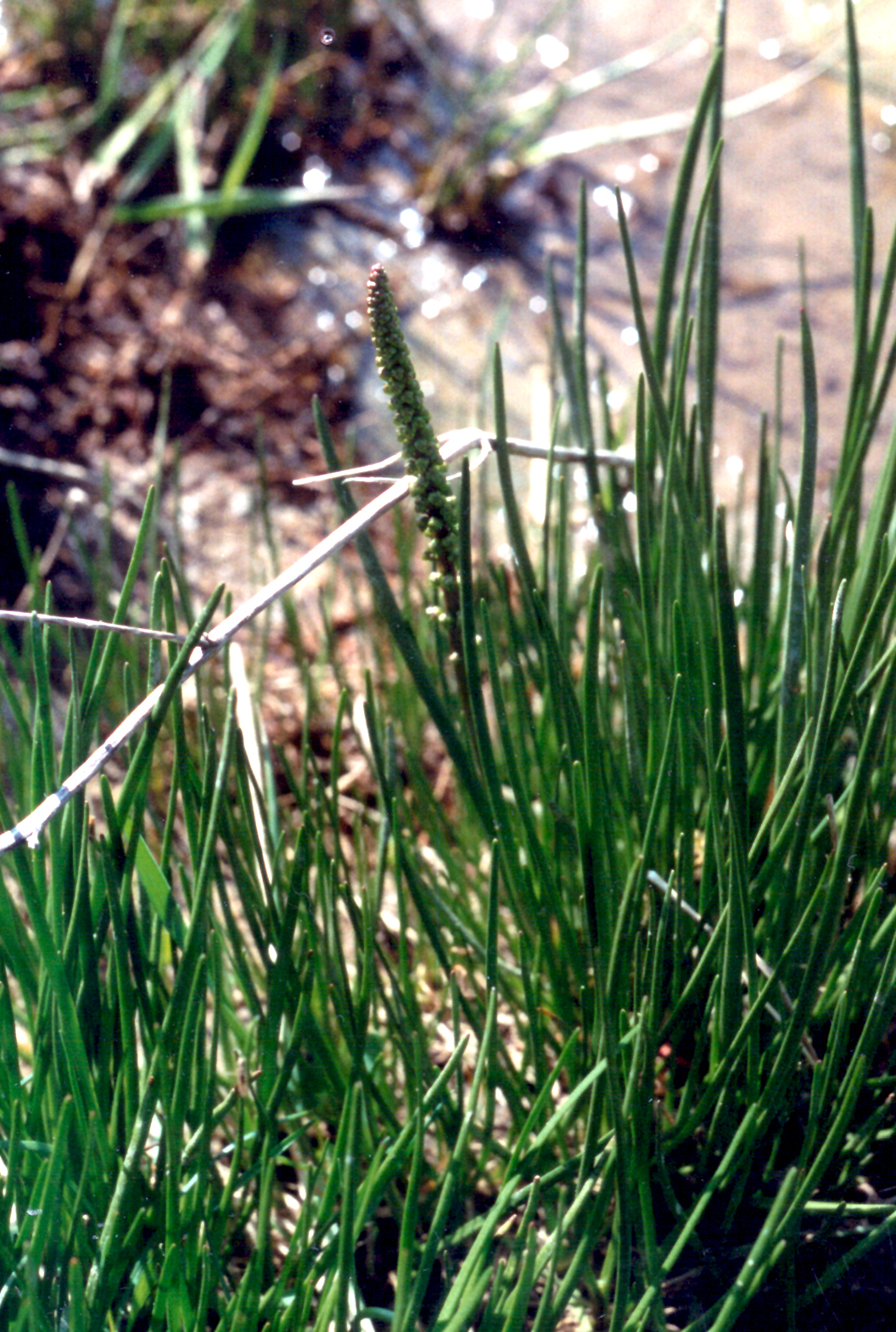 Stranddreizack (Triglochin maritima), Salzwiese an ostfriesischer Festlandsküste